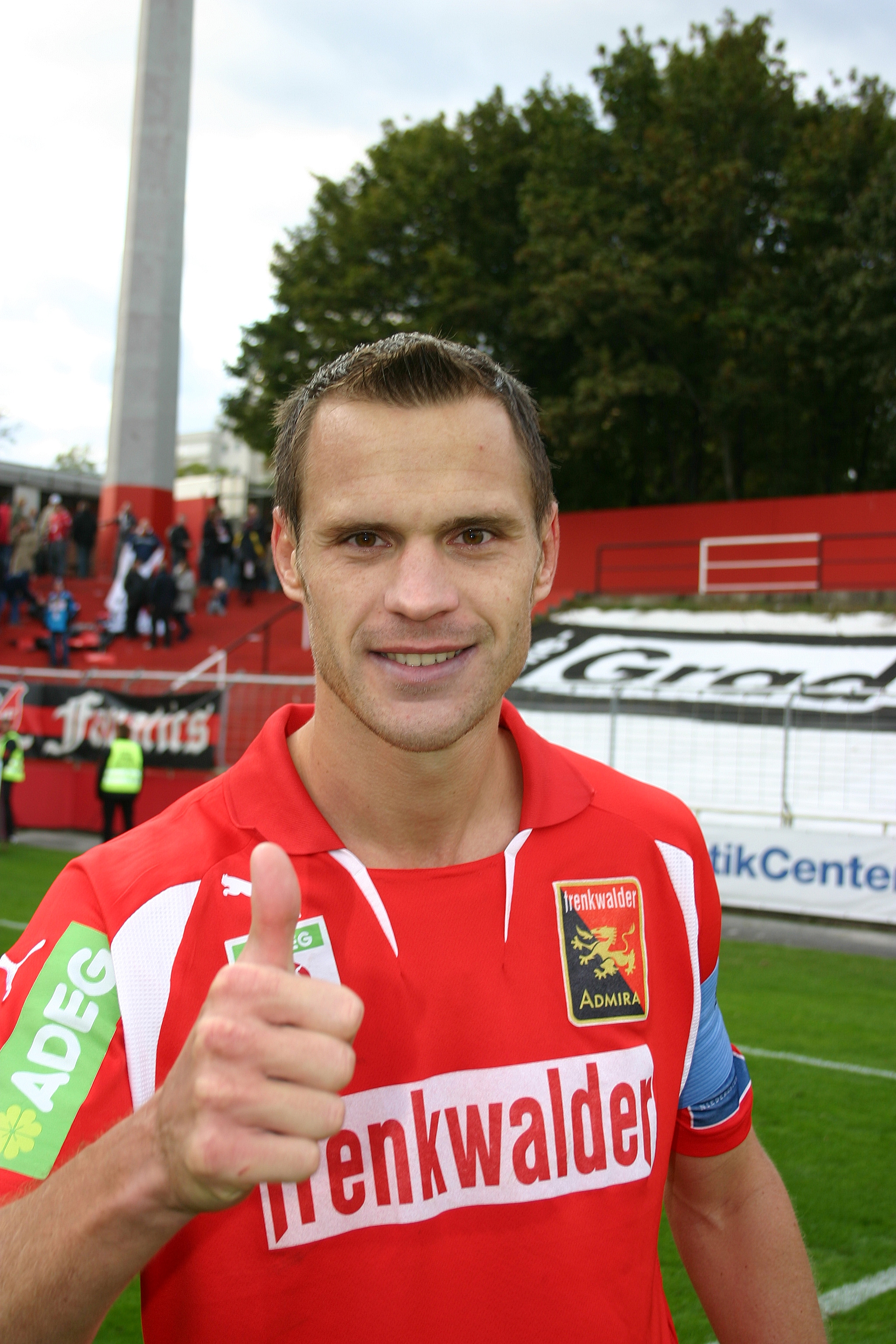 Ernst Dospel – Trenkwalder Admira Wacker